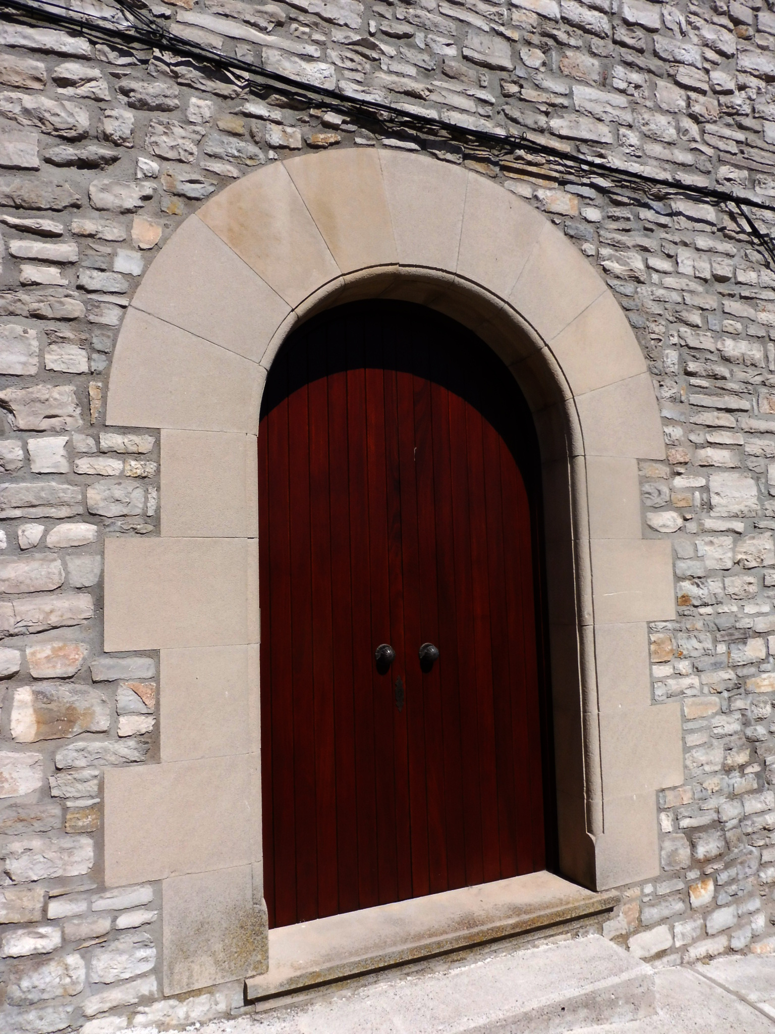 Castell de la Tallada (Sant Guim de Freixenet), portal